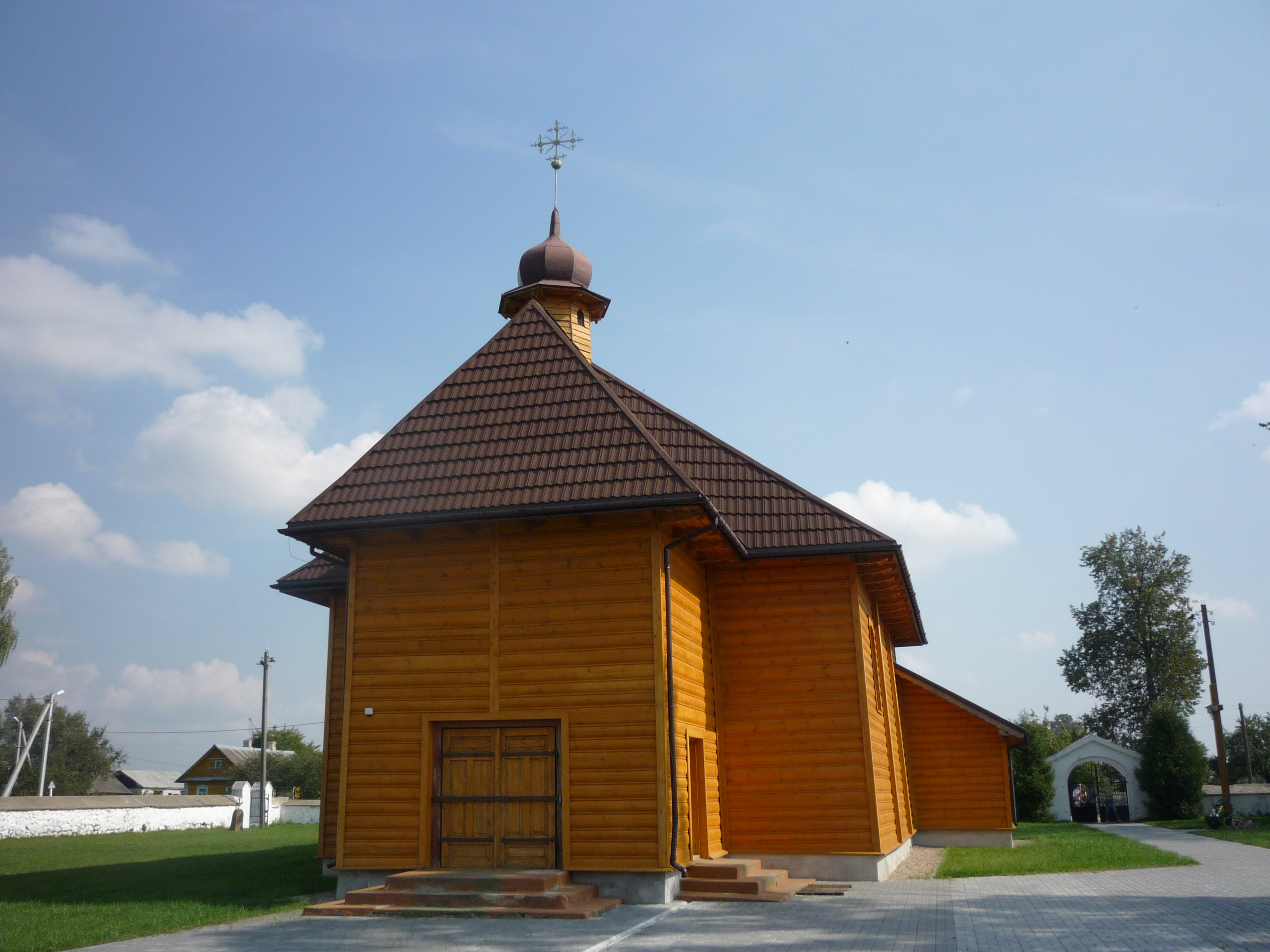 Беларуская (тарашкевіца): Касьцёл Дабравешчаньня Найсьвяцейшай Дзевы Марыі. в. Тракелі This is a photo of Belarusian heritage monument. Reference number: 413Г000143 ( WLM)